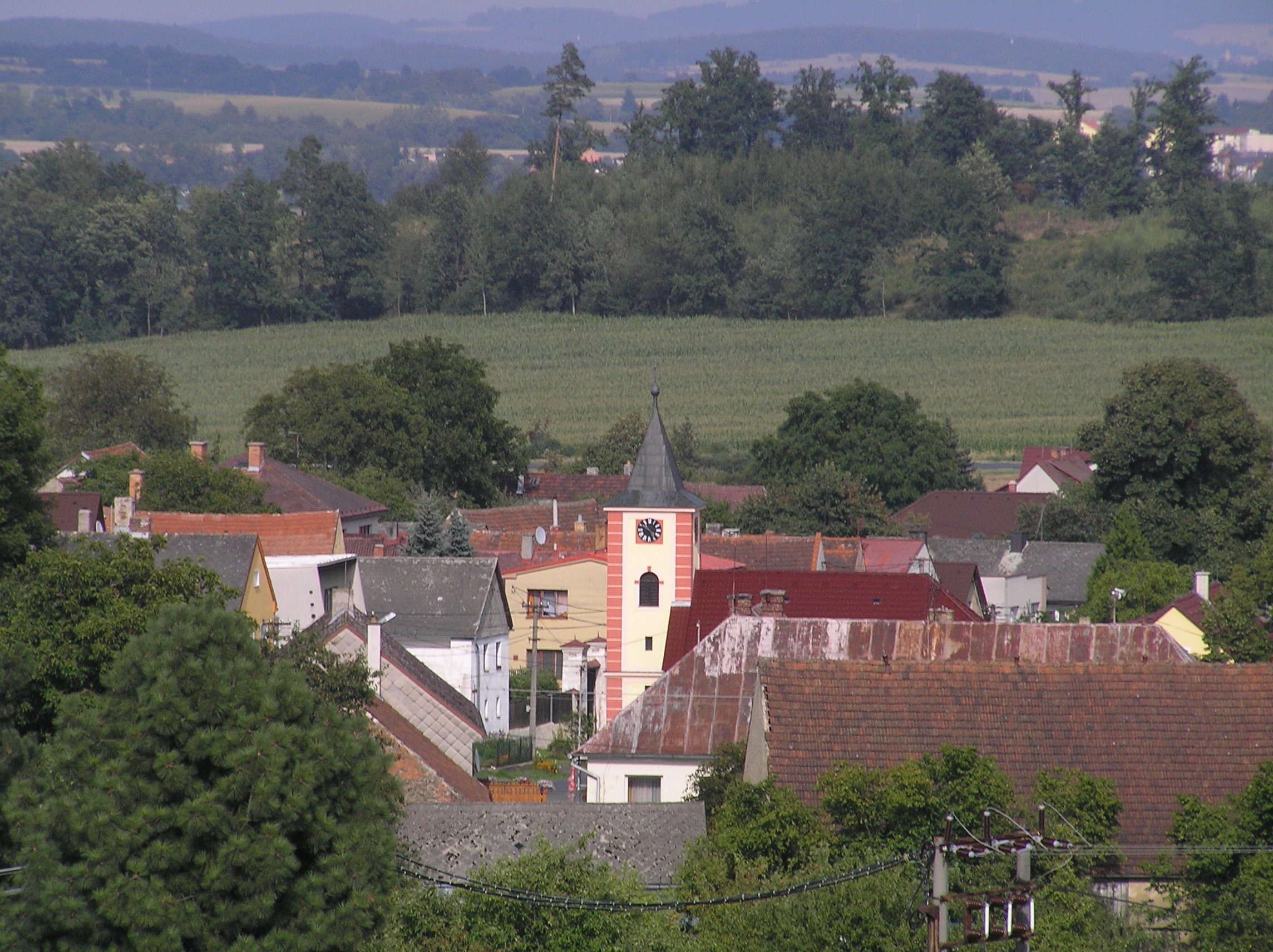 Újezd u Domažlic - pohled na ves ze sedla mezi Hrádkem a Václavkovou horou